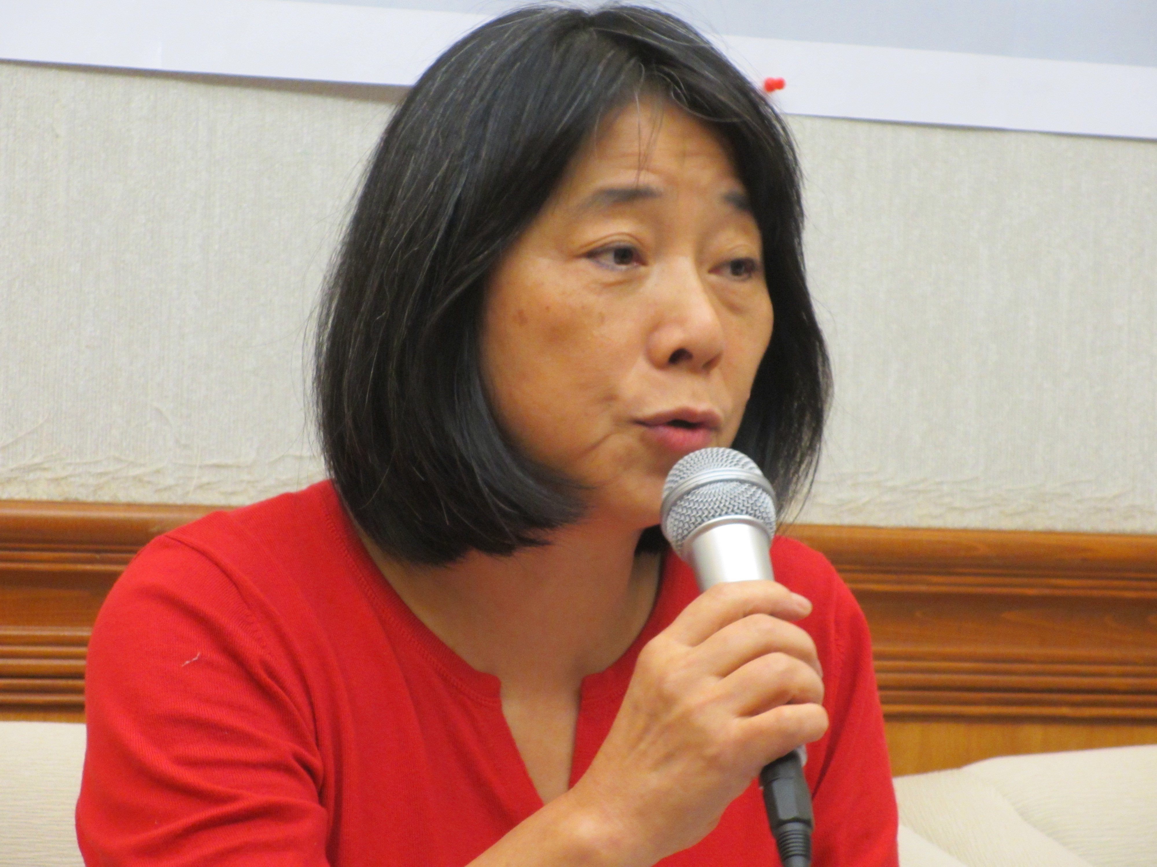 中文（台灣）: 台灣民間健保監督聯盟召集人黃淑英(美國之音張永泰拍攝)